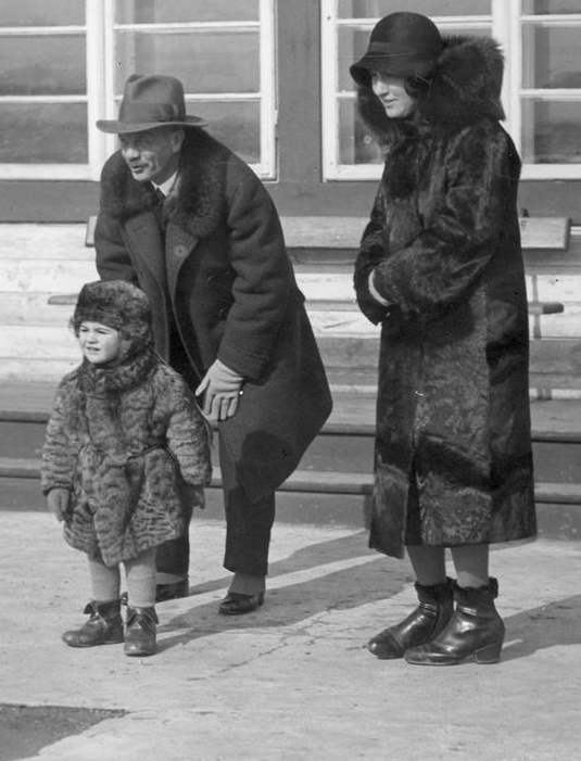 Kazimierz Świtalski with his wife and son